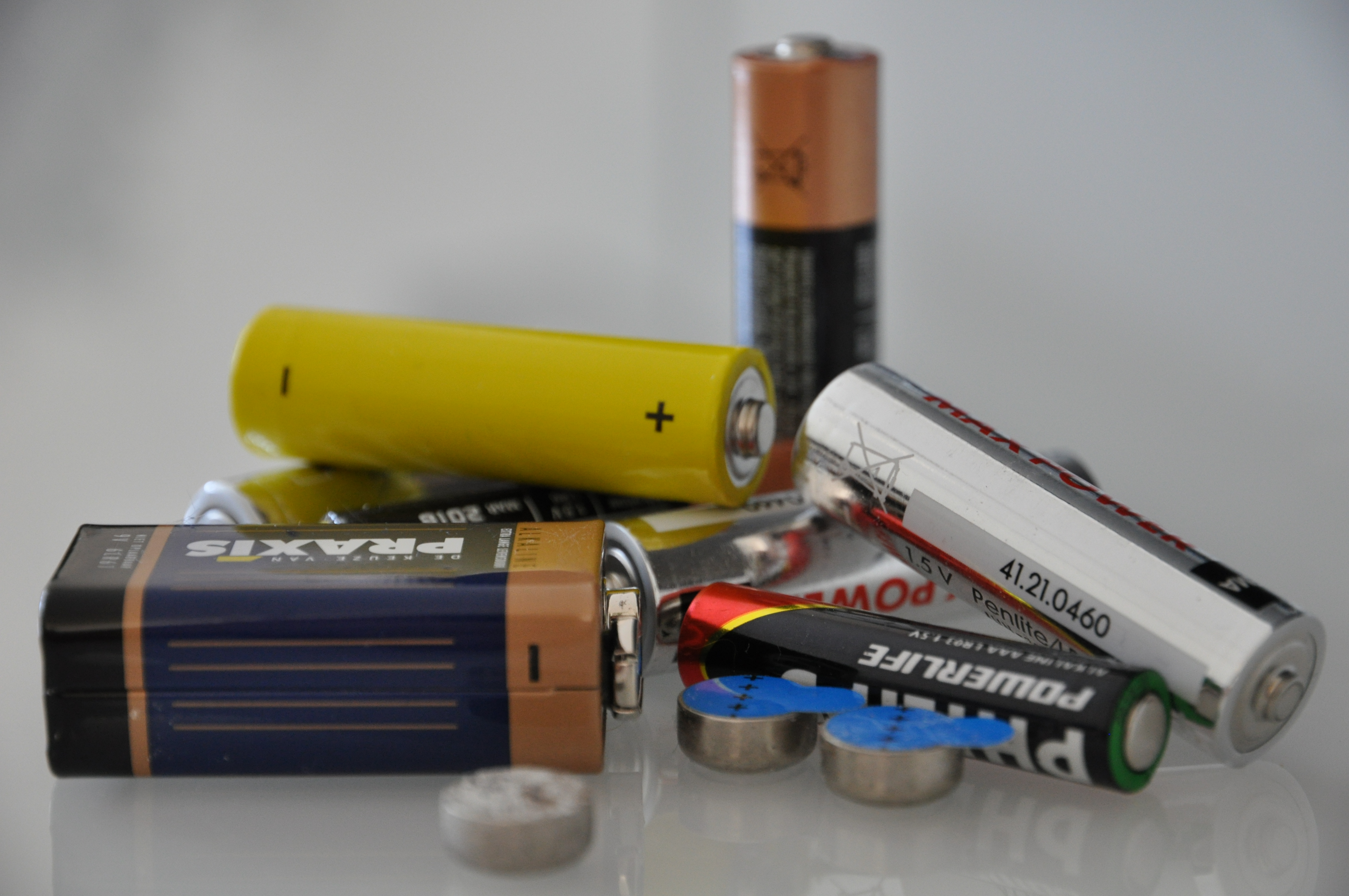 Batterijen.